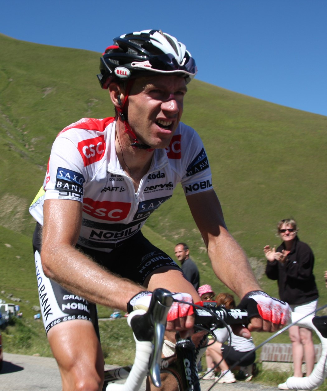 7660 voigt